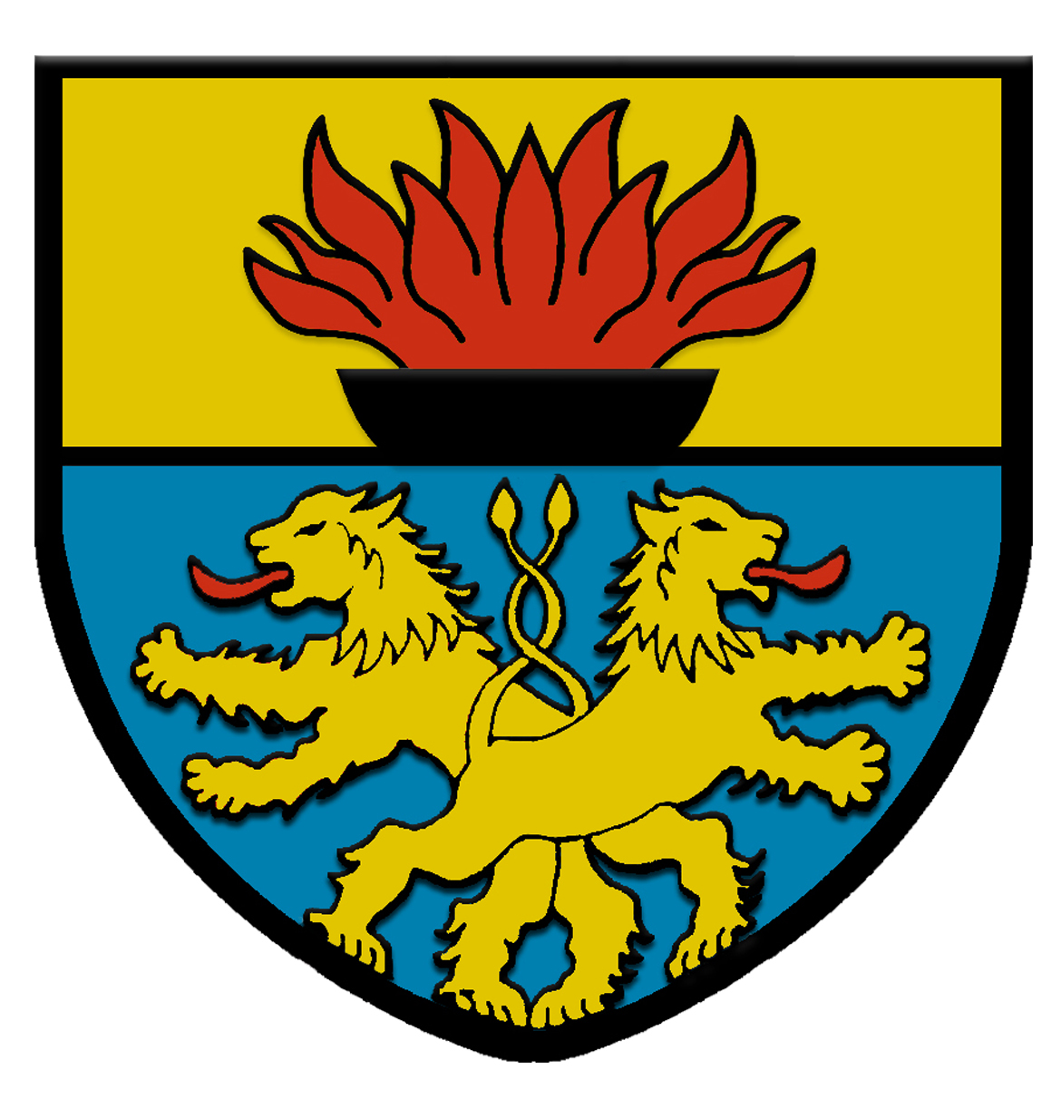 Wappen